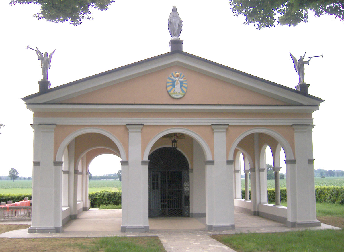 La Fonte miracolosa del Santuario della Madonna della Fontana, a Camairago (LO) Italia